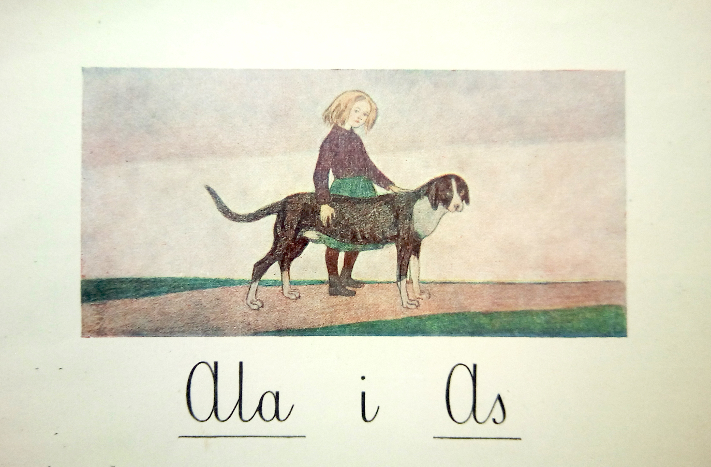 Ilustracja z pierwszego wydania elementarza Mariana Falskiego, wydanie z 1910 roku z ilustracjami Jana Rembowskiego